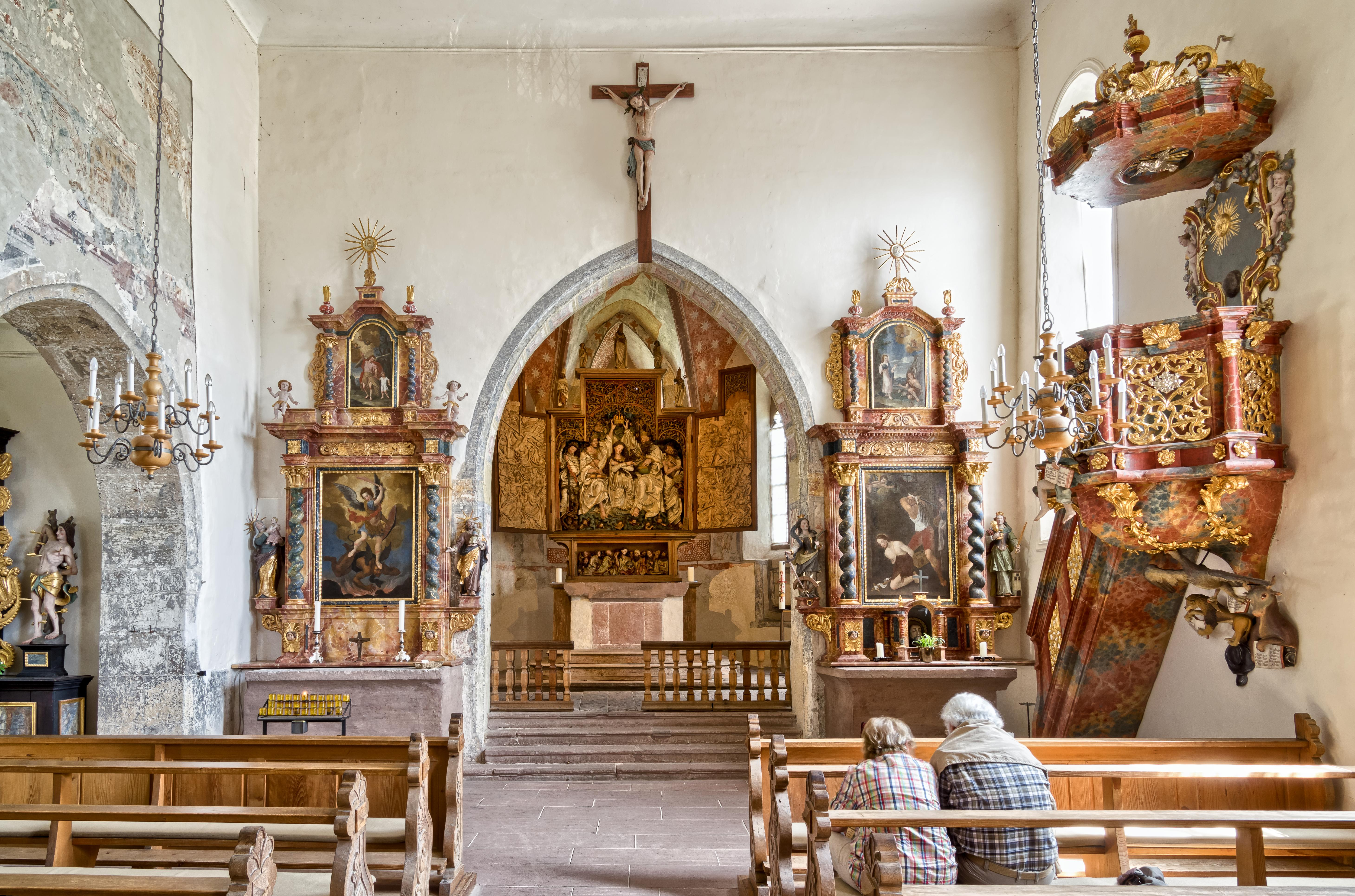 St. Michaelis in Niederrotweil Die Kirche ist einer der ältesten im Breisgau. Entstehung und Frühzeit ist nicht dokumentiert. Die frühromanische Bauform deutet auf das 11. Jahrhundert für dieses Bauwerk. Die erste Urkunde die die Kirche erwähnt stammt aus dem Jahre 1175. Die Kirche liegt am Badischen Teils des Jakobswegs von Rust nach Breisach